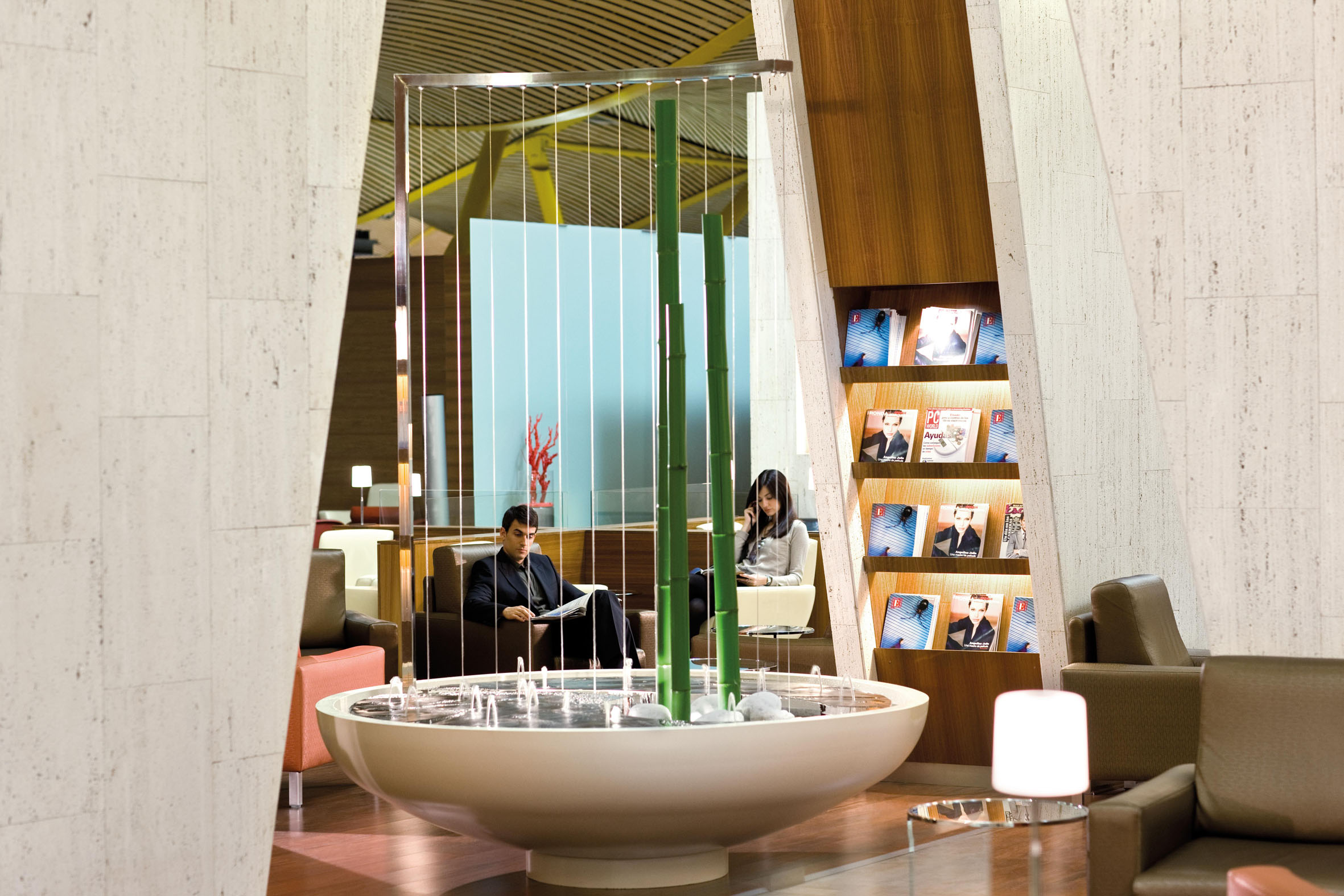 Sala VIP en el aeropuerto de Madrid-Barajas, en la terminal 4. Sala Velazquez Our VIP lounge in Madrid's Barajas Airport terminal 4. Notre salle VIP à l'aéroport de Madrid-Barajas, terminal 4.